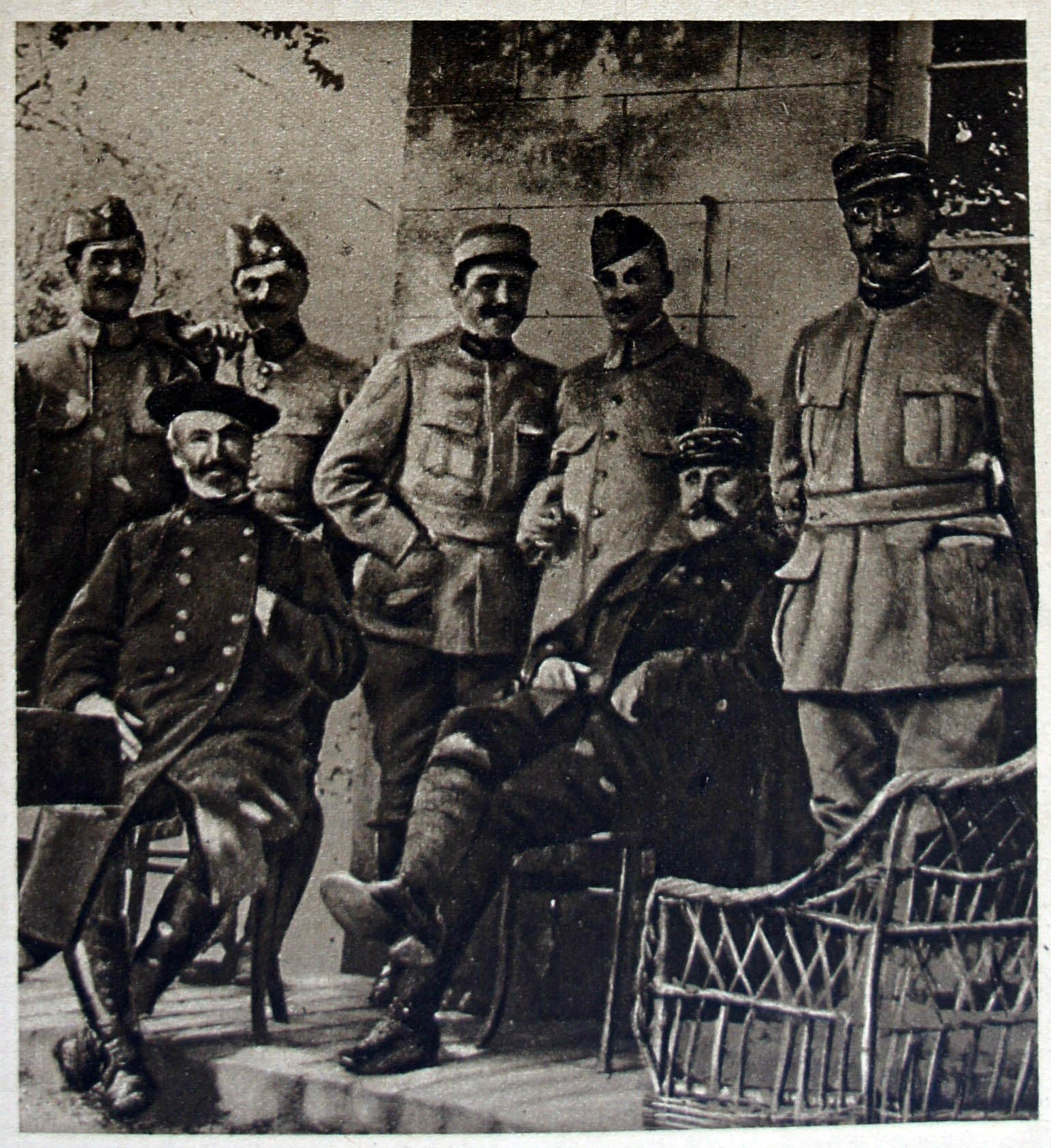 publié dans le journal "le miroir.